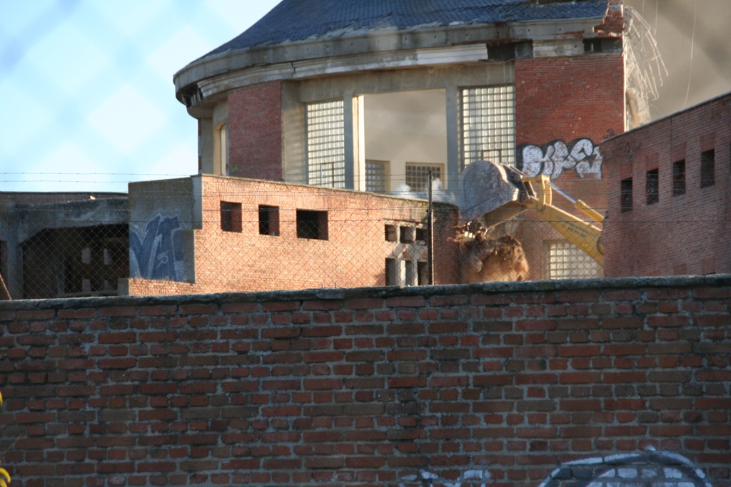 Momentánea del derribo de la cúpula de la Cárcel de Carabanchel. Fotografía tomada el domingo 26 de octubre de 2008.